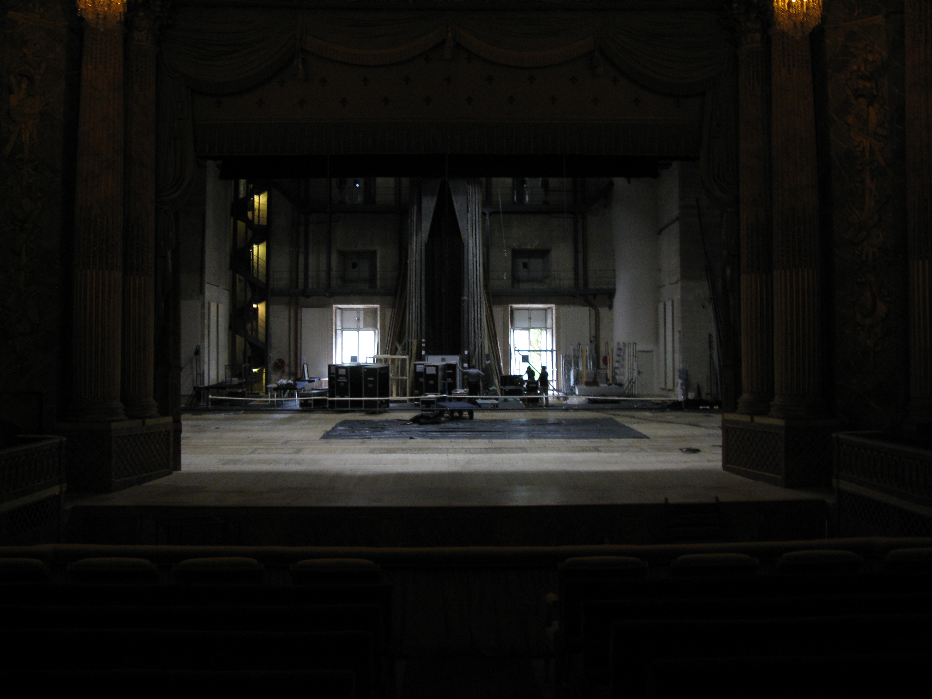 scène de l'opéra royal du château de Versailles